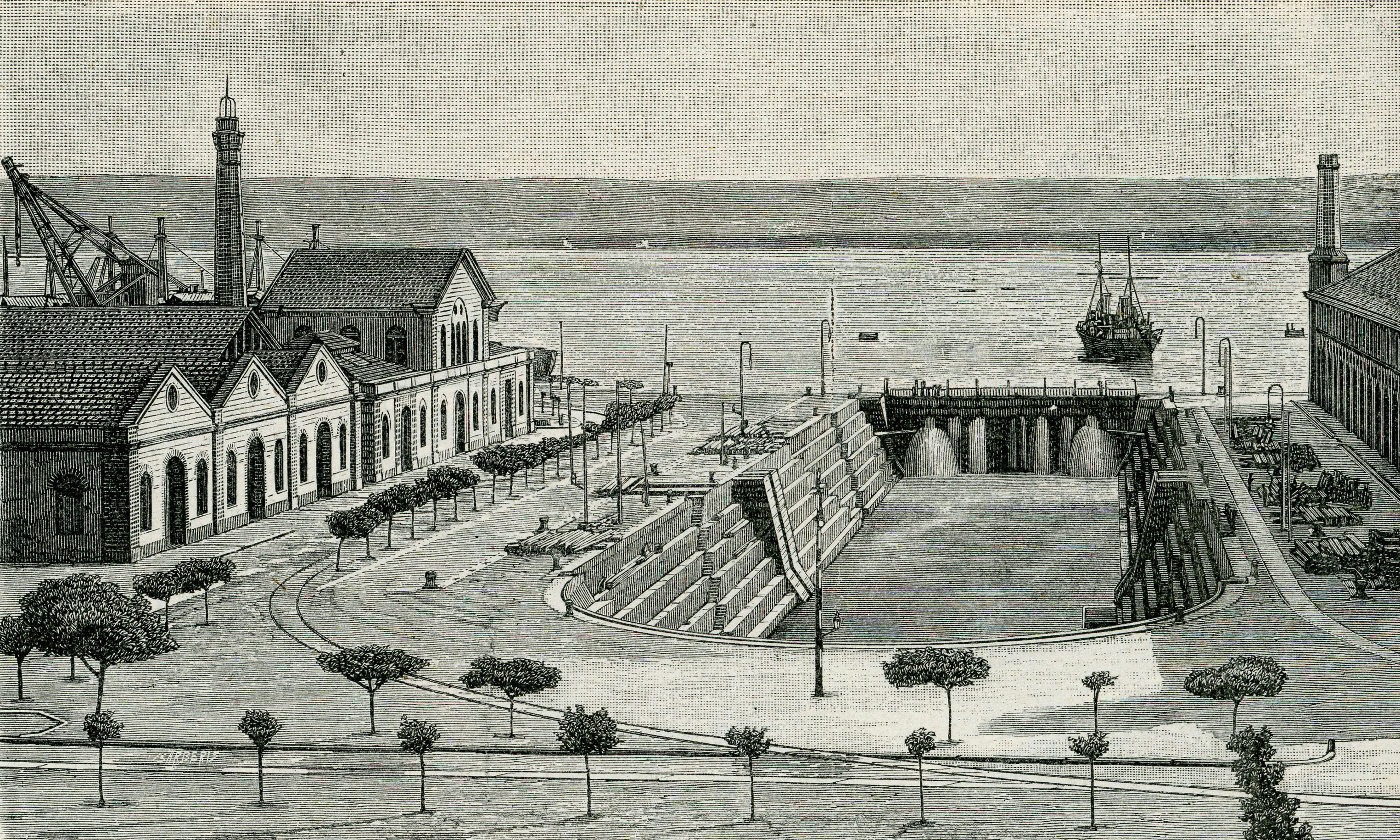 Taranto (Arsenale Militare): veduta del bacino mentre vien riempito d’acqua per l’immersione di una nave (xilografia di Barberis).